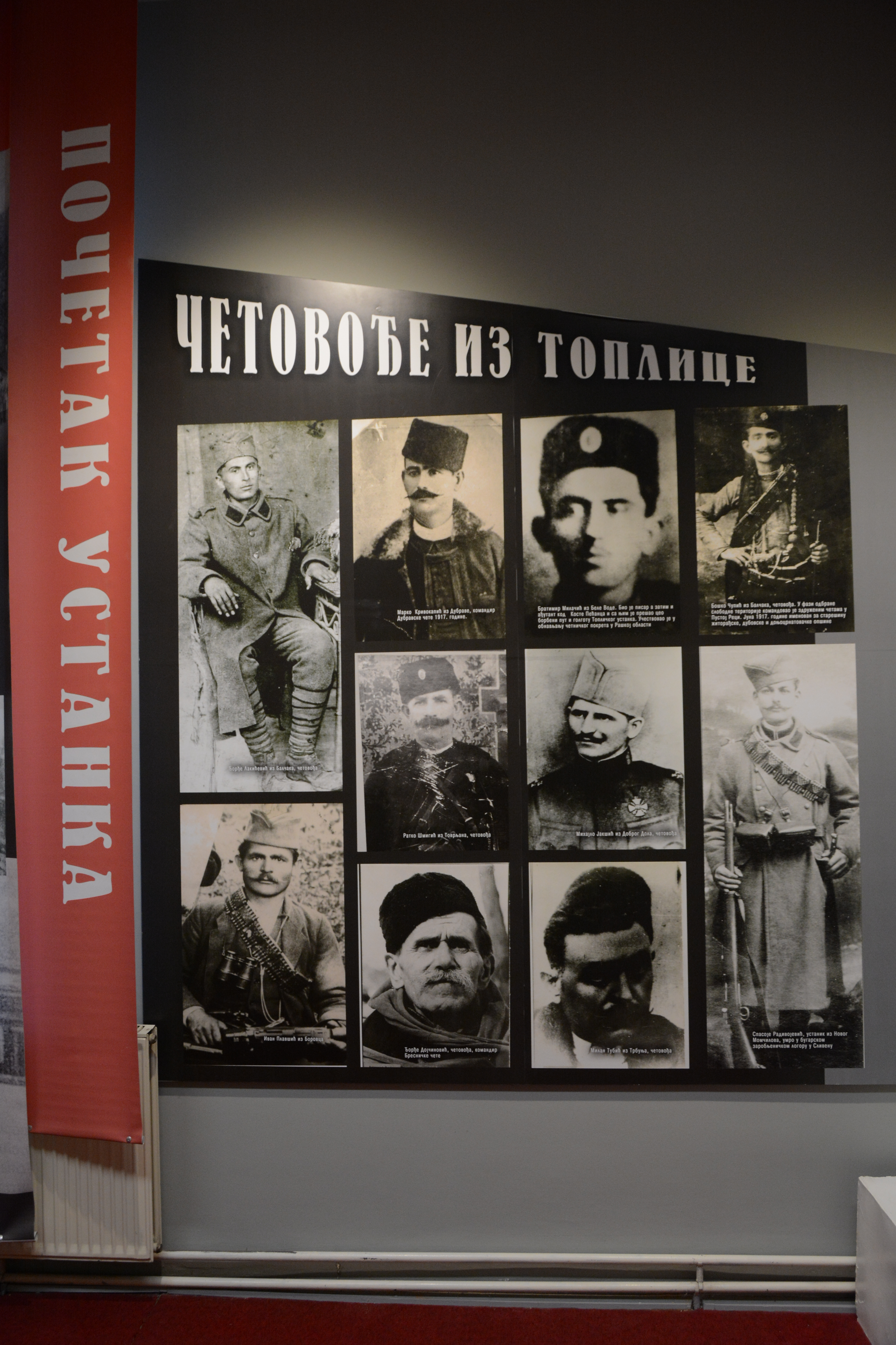 Ова датотека је донација Народног музеја Топлице, у оквиру програма стажирања реализованог од стране Викимедије Србије. This file is donated by the National museum of Toplice, as part of the Wikipedian in Residence program implemented by Wikimedia Serbia.